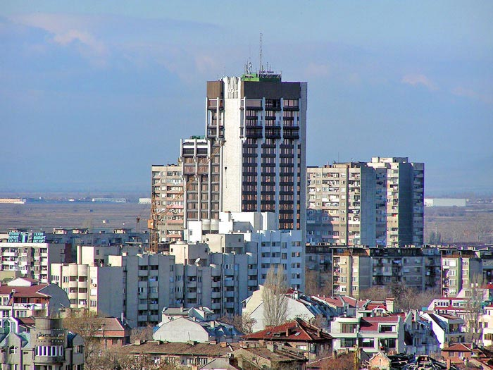 Izgled ot Plovdiv